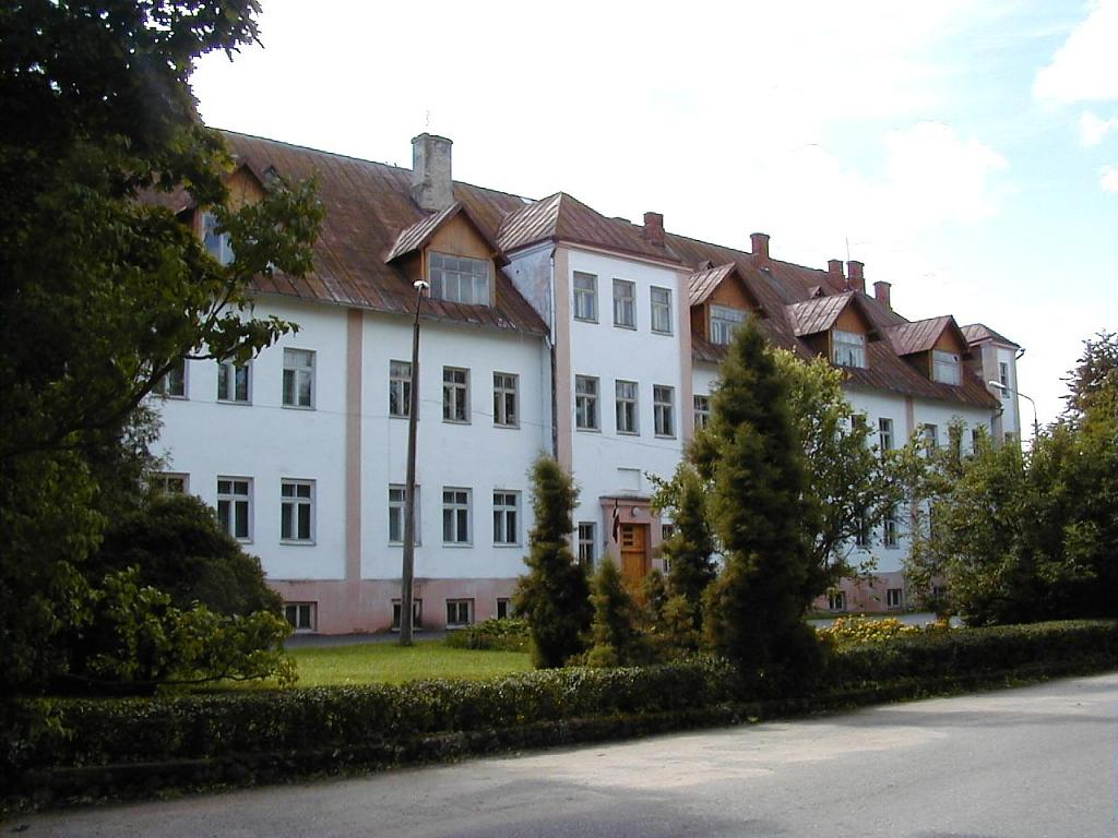 Višķu muižas pils 2001-08-11